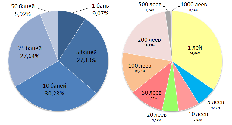 Количество монет и банкнот разных номиналов в обращении в Молдавии на 31 декабря 2016